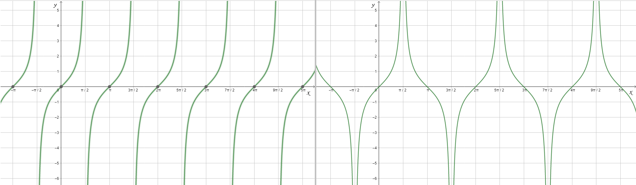 График тангенса без и с заменой синуса на косинус